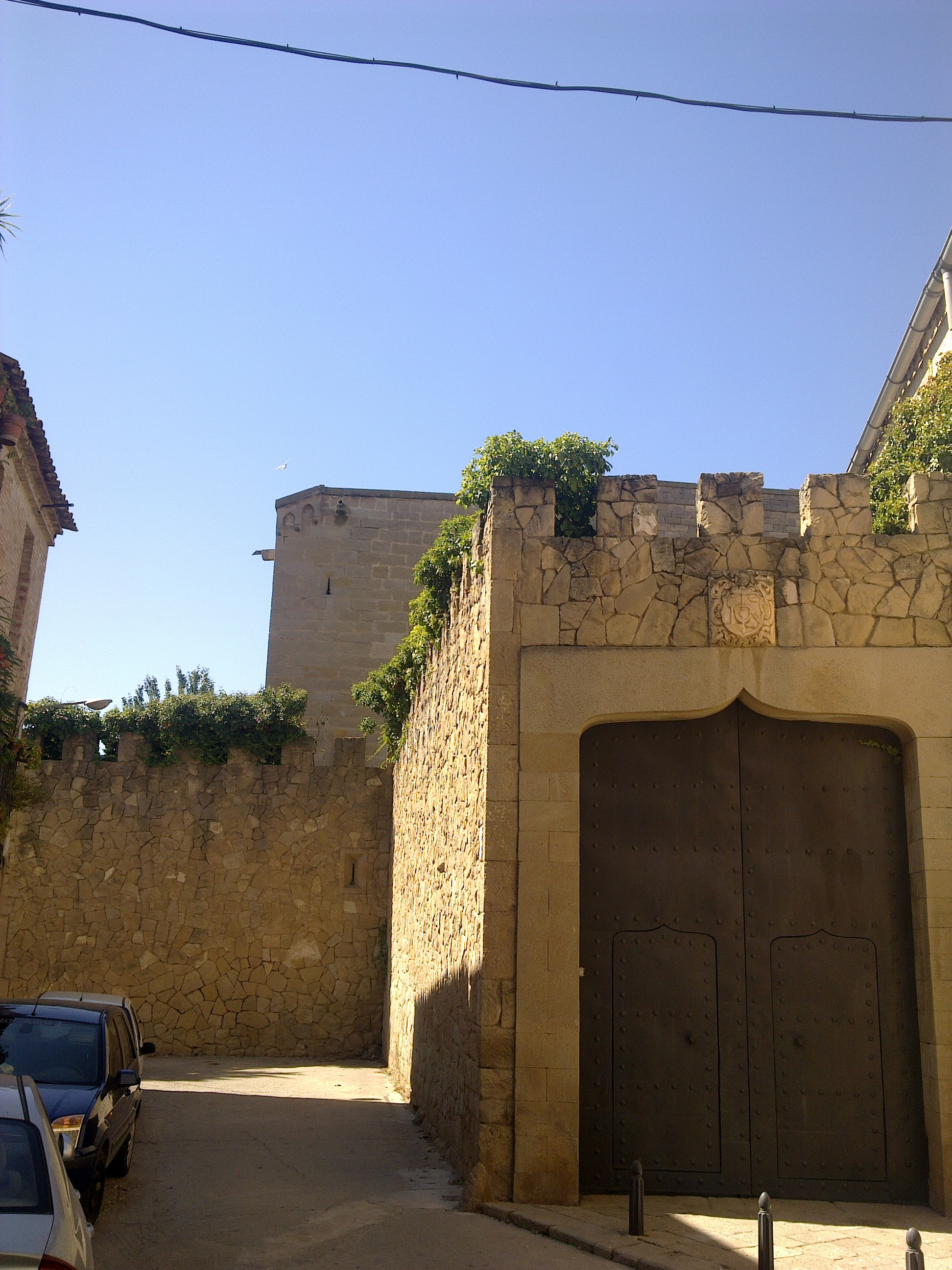 Obra popular, historicisme segles XVI, XX